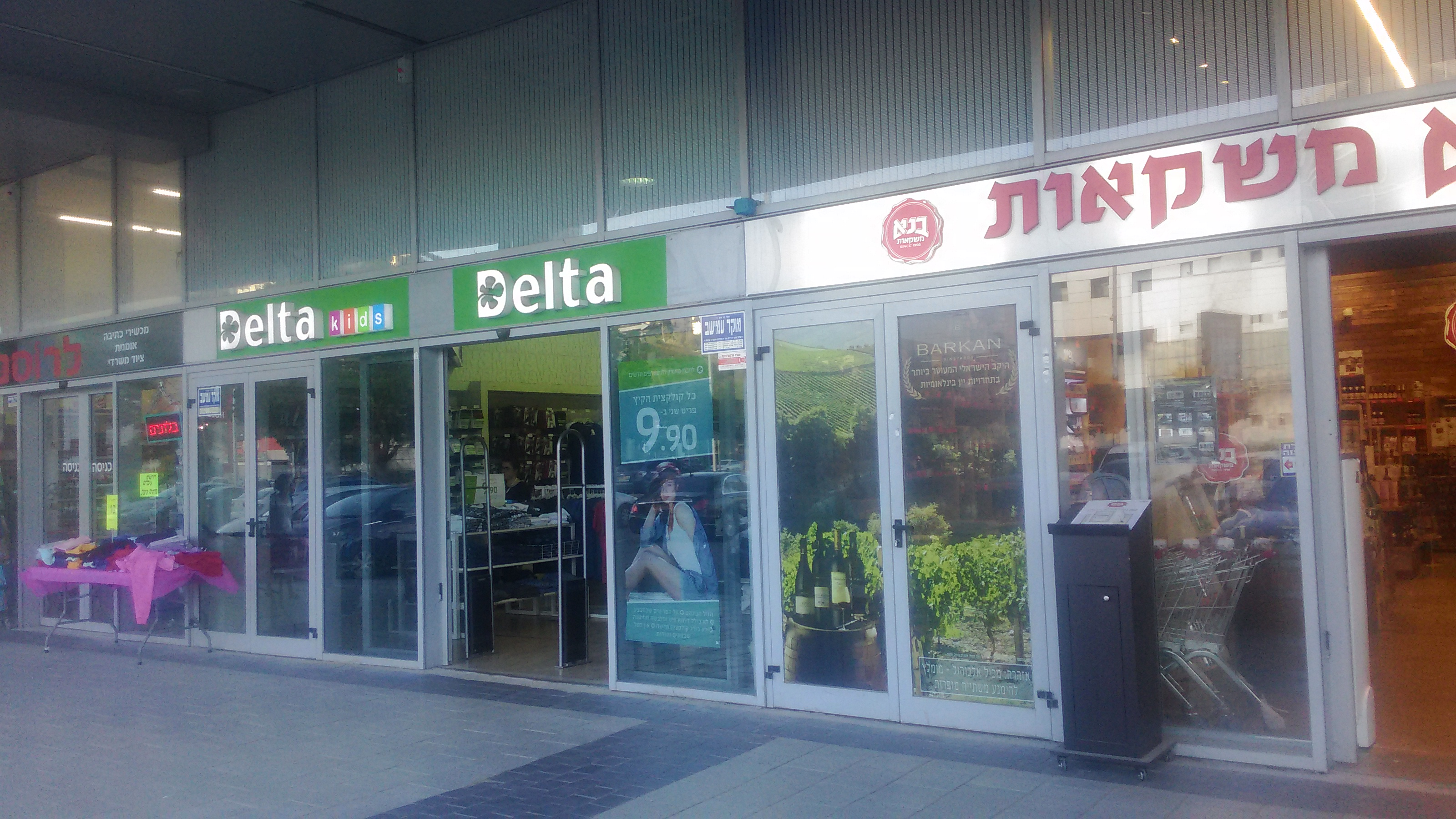 סניף דלתא